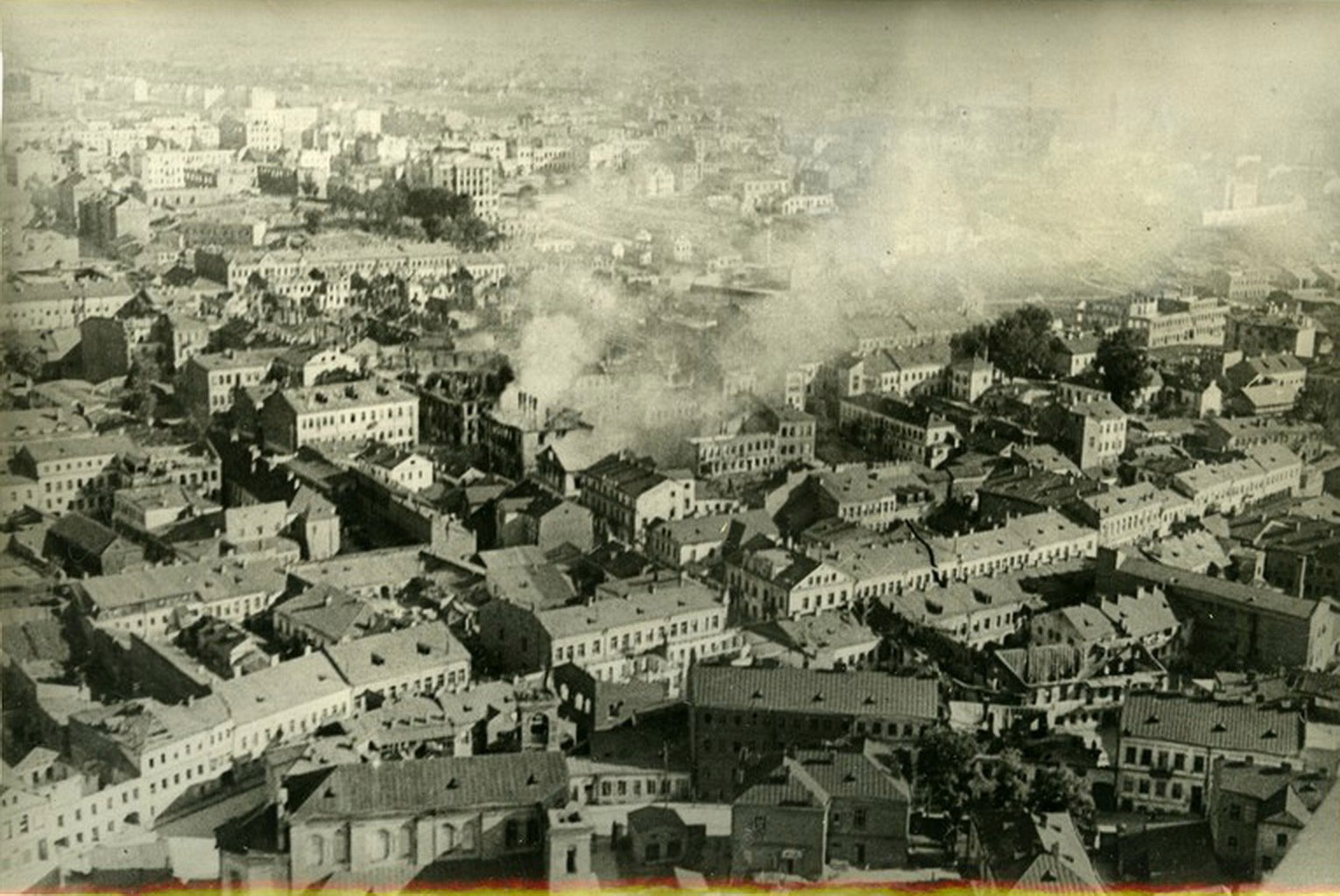 Беларуская (тарашкевіца): Менск (Miensk), вуліца Няміга (vulica Niamiha). Аэрафотаздымак